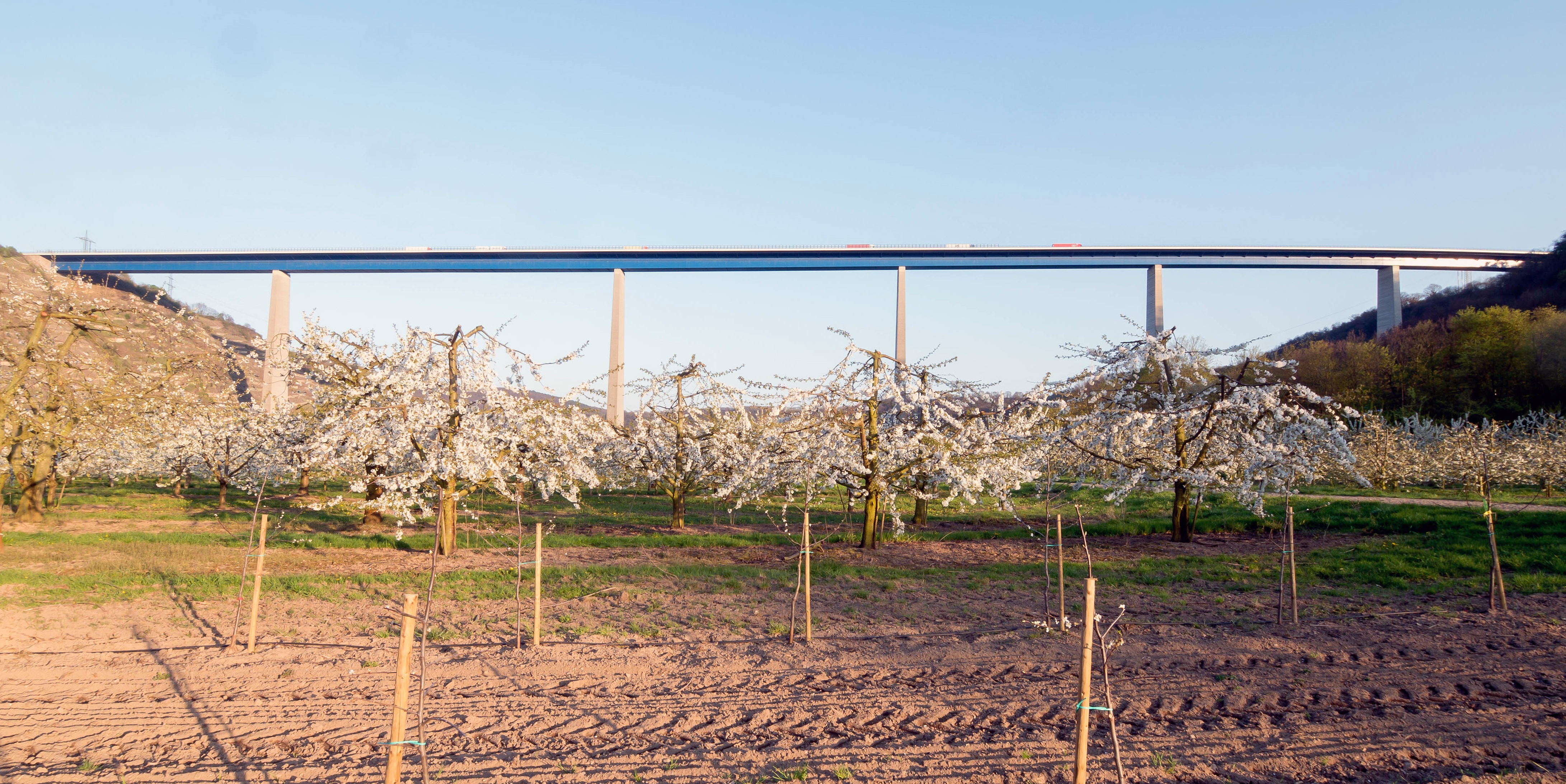 Von den Kirschbaumfeldern des Dieblicher Moselbogens geht der Blick zur Moseltalbrücke der Bundesautobahn A61, die Eifel und Hunsrück verbindet.